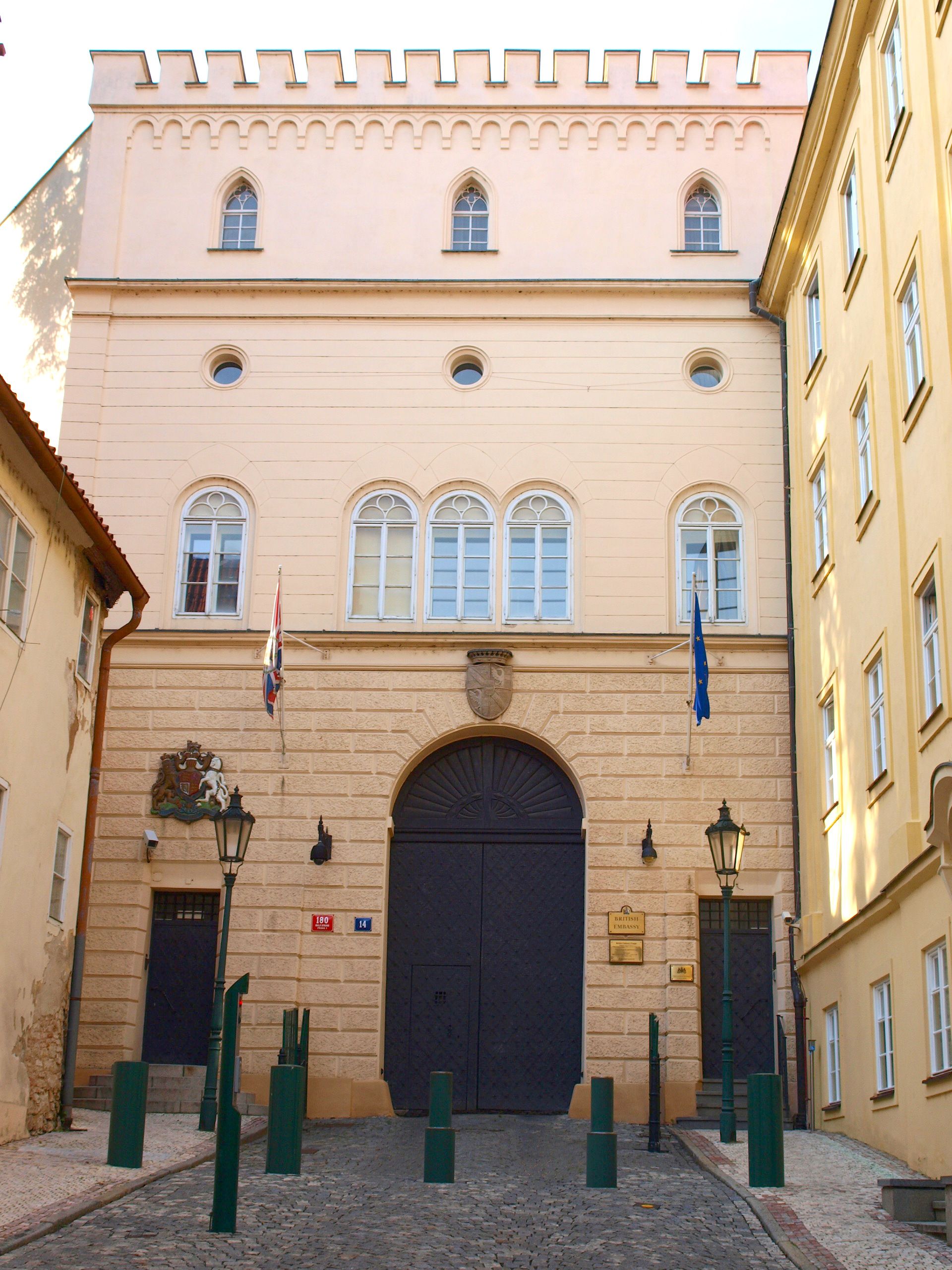 Thunovský palác v Thunovské ulici